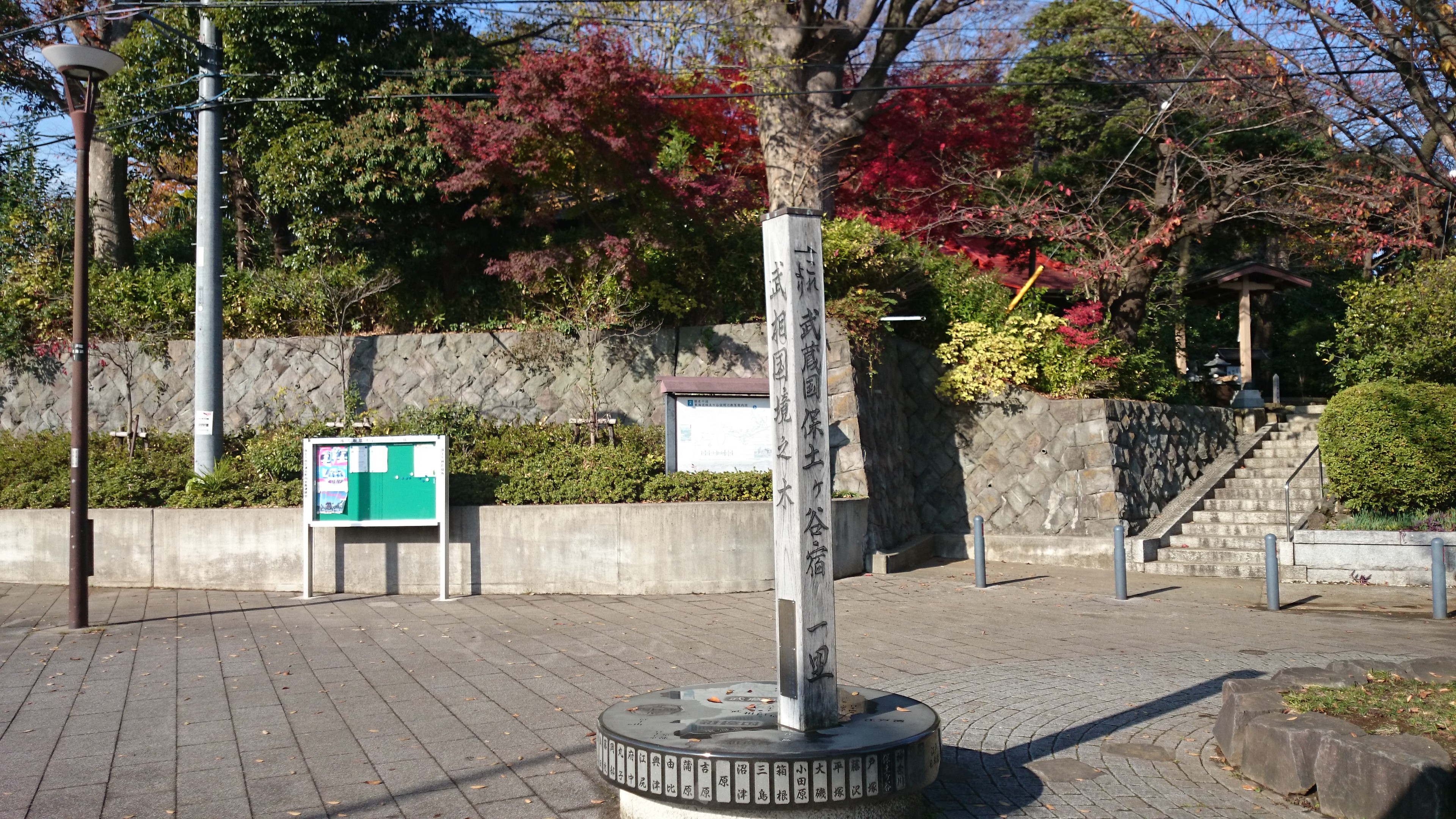 境木地蔵横浜市保土ヶ谷区 NTTドコモ Xperia Z1fにて撮影